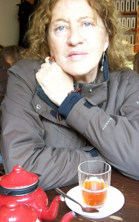 Teresa Amy en Malaga, España (2008)